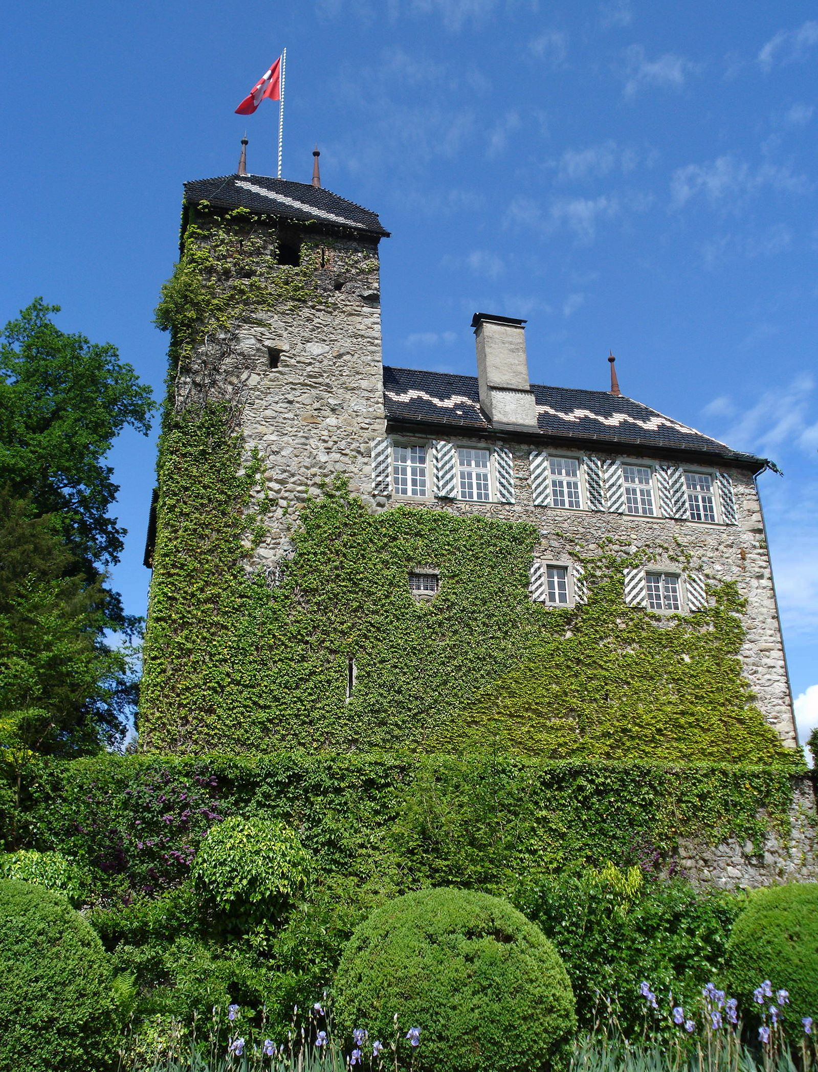 Altes Schloss Buonas